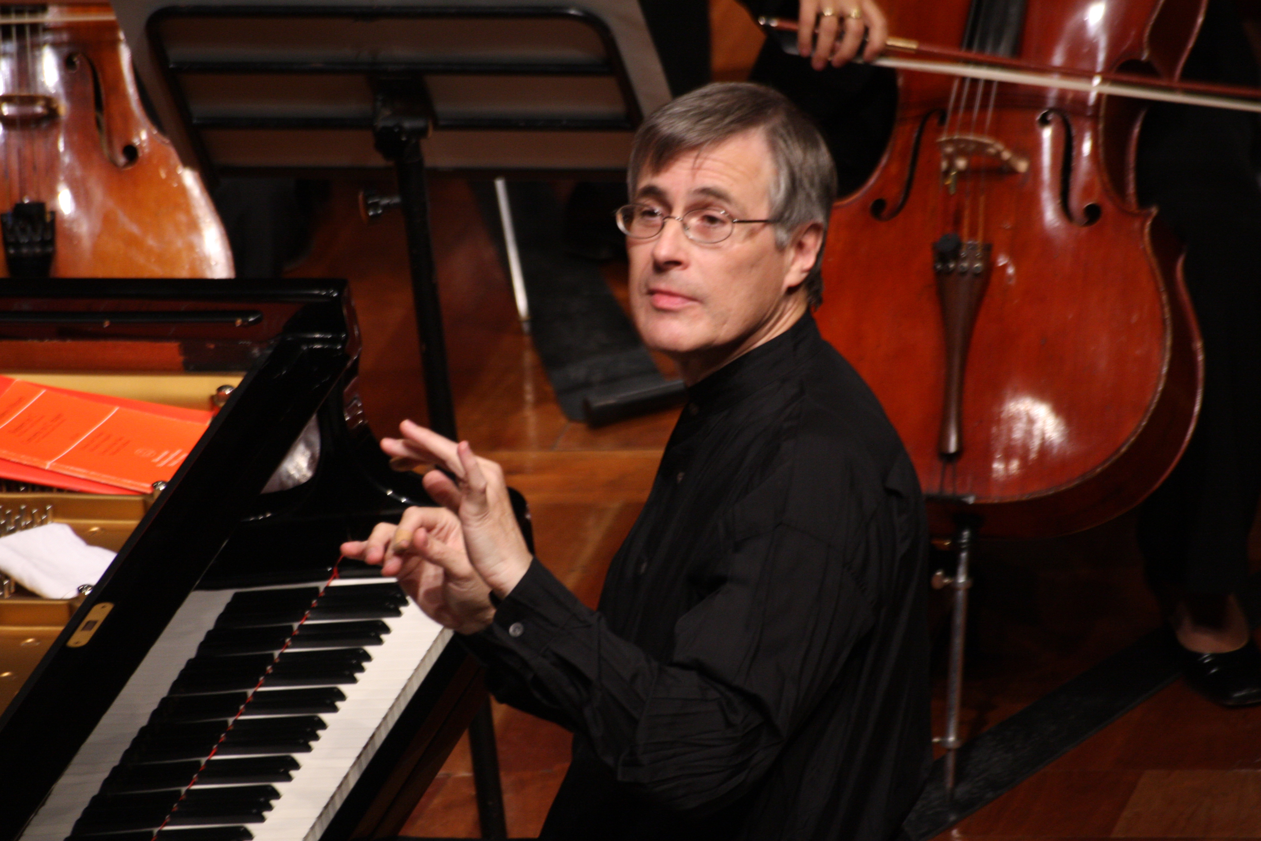 Auditorium Giovanni Agnelli, Lingotto, 7 settembre 2008 Orchestra da camera di Losanna Christian Zacharias, direttore e pianoforte